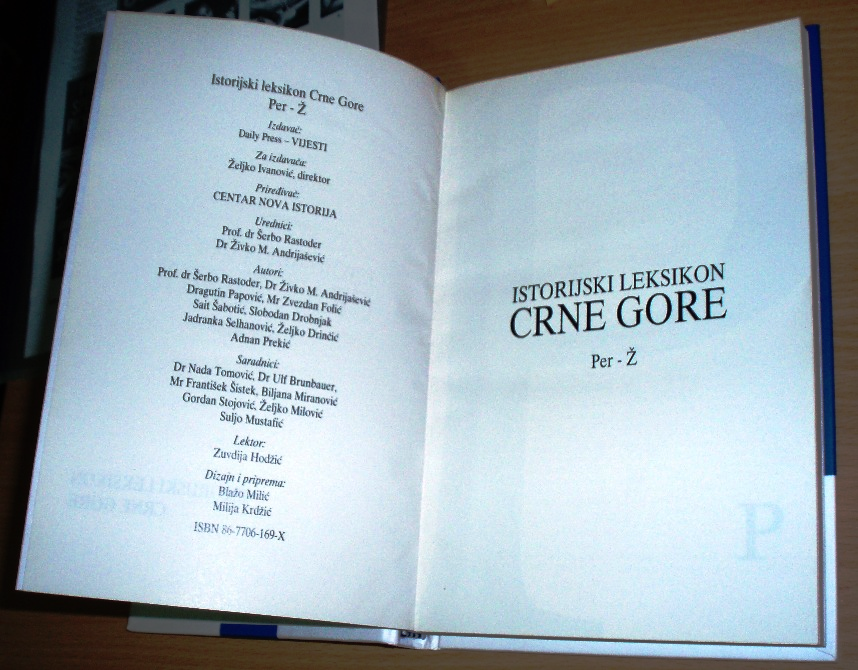 Лексикографско издање „Историјски лексикон Црне Горе“ издато је од стране „Daily Press - Вијести“ (штампано у Падови – „Grafica Veneta“) у пет књига, 2006. године.